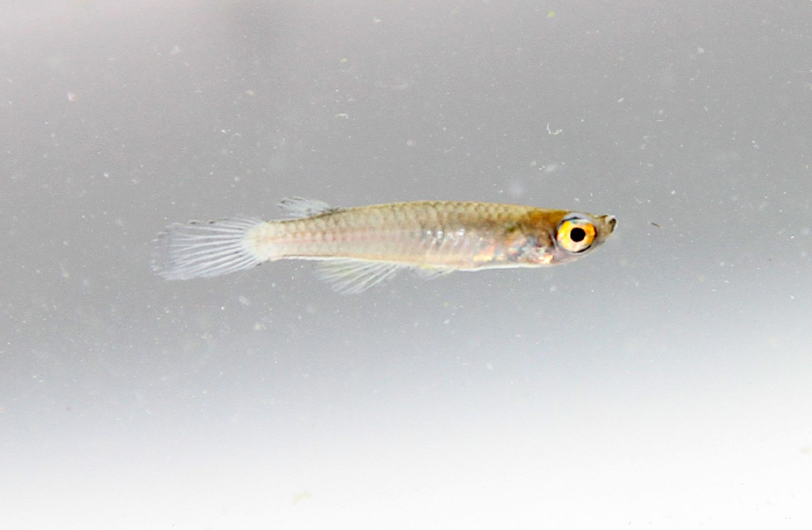 Fluviphylax sp.